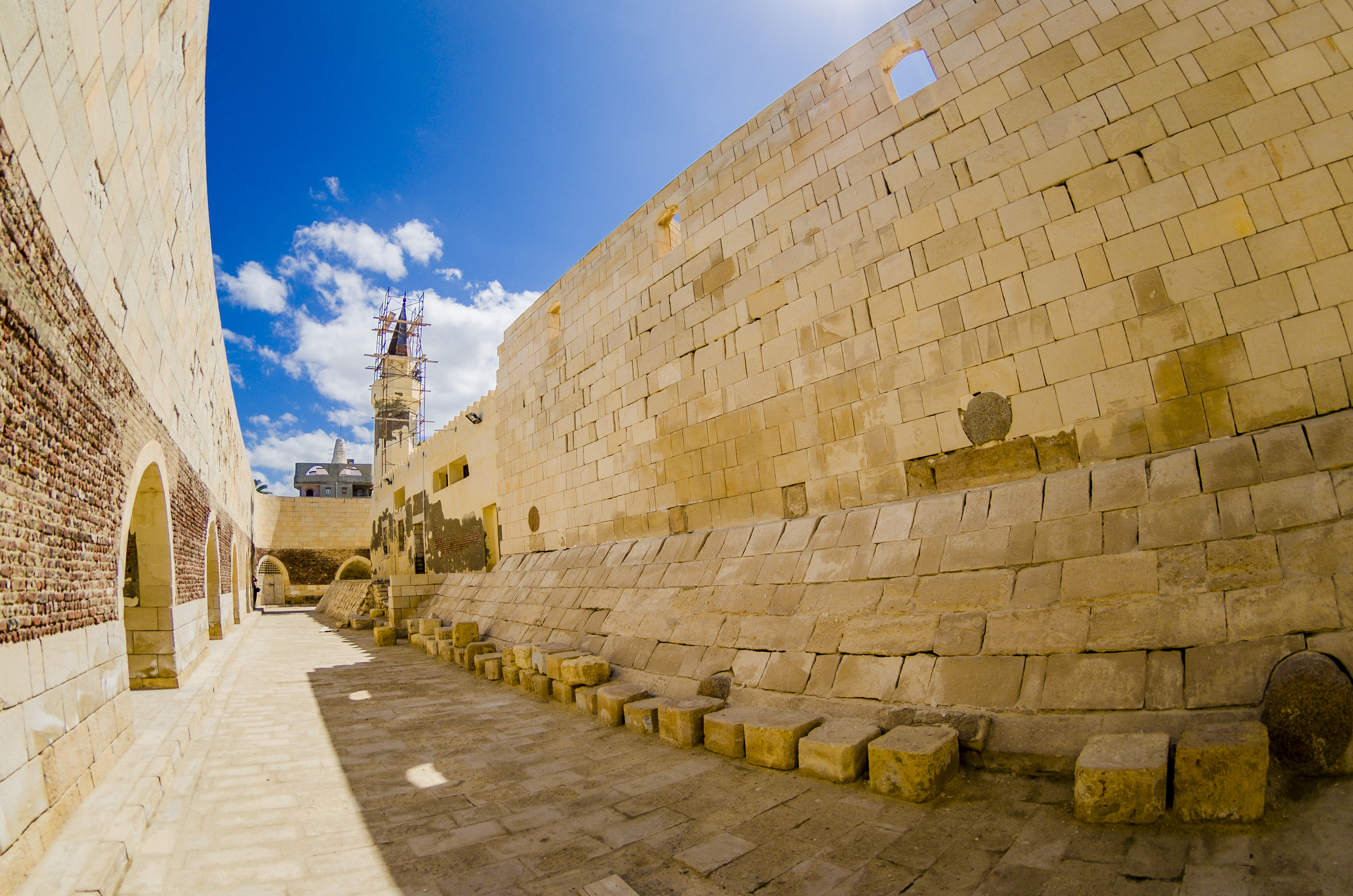 المعالم الاثرية من رحلة رشيد 5